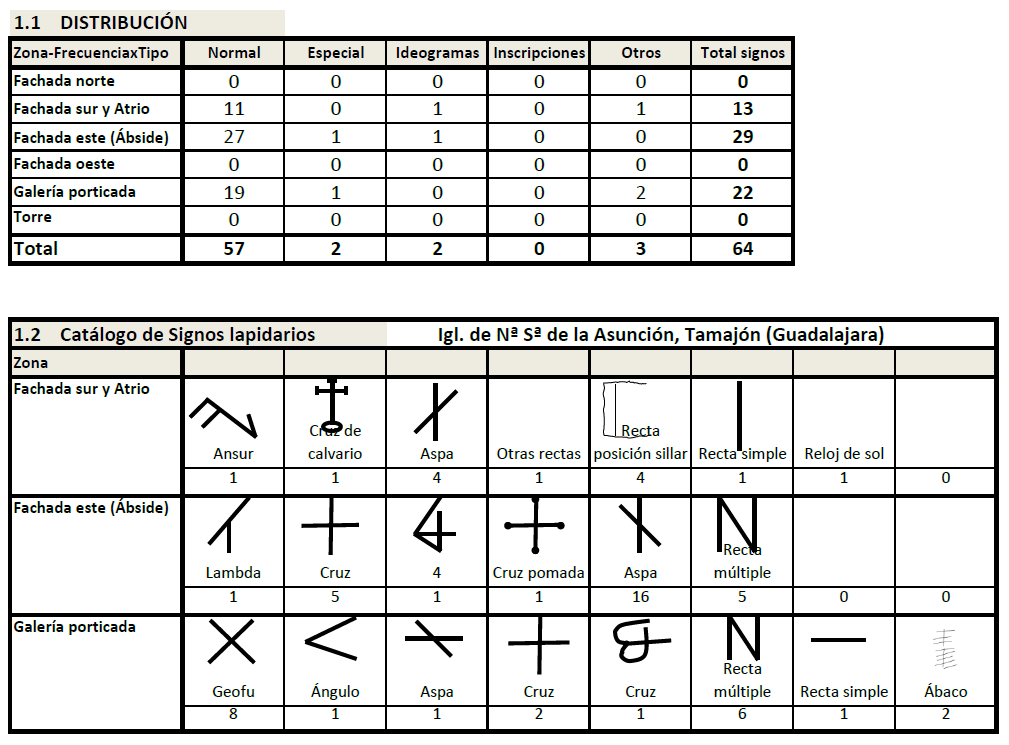 Iglesia de Nª Sª de la Asunción, Tamajón (Guadalajara), Castilla-La Mancha, España, románica s XII. Catálogo de Signos lapidarios.